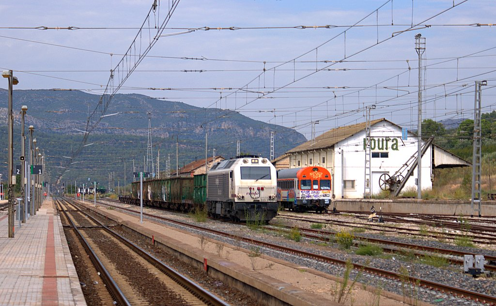 Vista de las vías de la estación